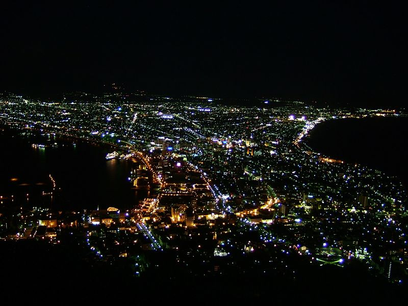 Hakodate night view